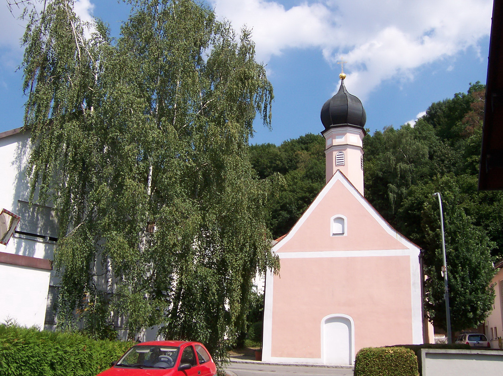 Ergoldsbach, Friedhofstraße 29. Katholische Kapelle St. Agatha. Im Kern mittelalterlicher Bau, 1726 barockisiert, mit Putzgliederung und Dachreiter mit Zwiebelhaube; mit Ausstattung.